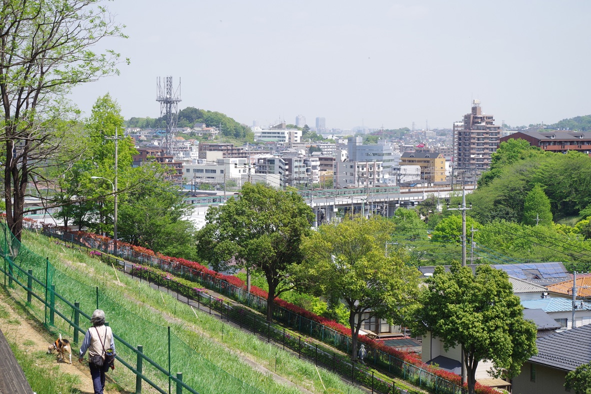 多摩市貝取の街並み160426